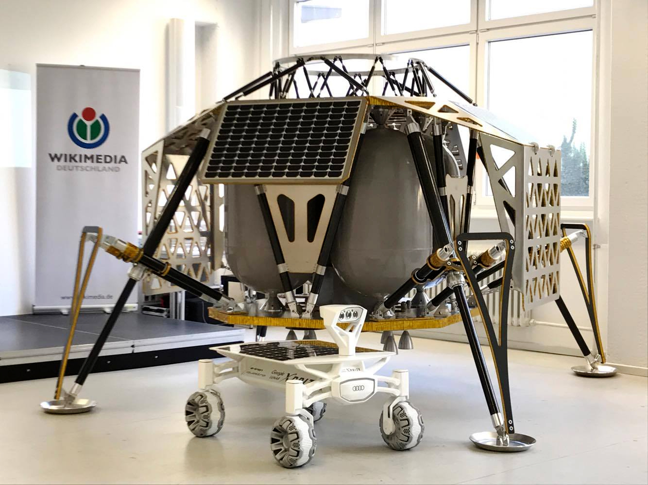 Landemodul ALINA und Mondrover der Part-Time Scientists für den Lunar X Prize.